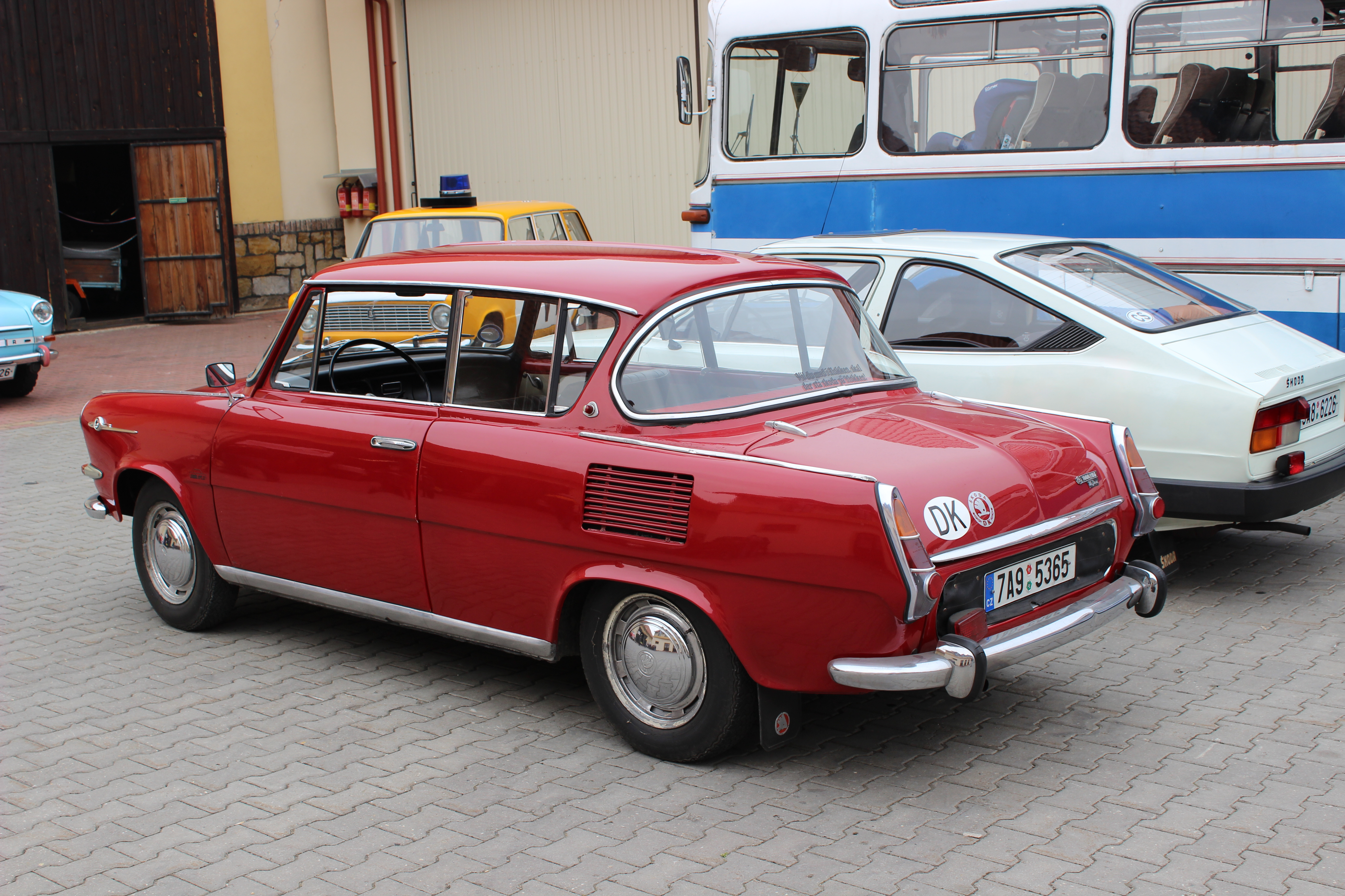 Automobil Škoda 1100 MBX v Muzeu socialistických vozů v Kozovazech (východně od Prahy). This photograph was taken with a Canon EOS 600D